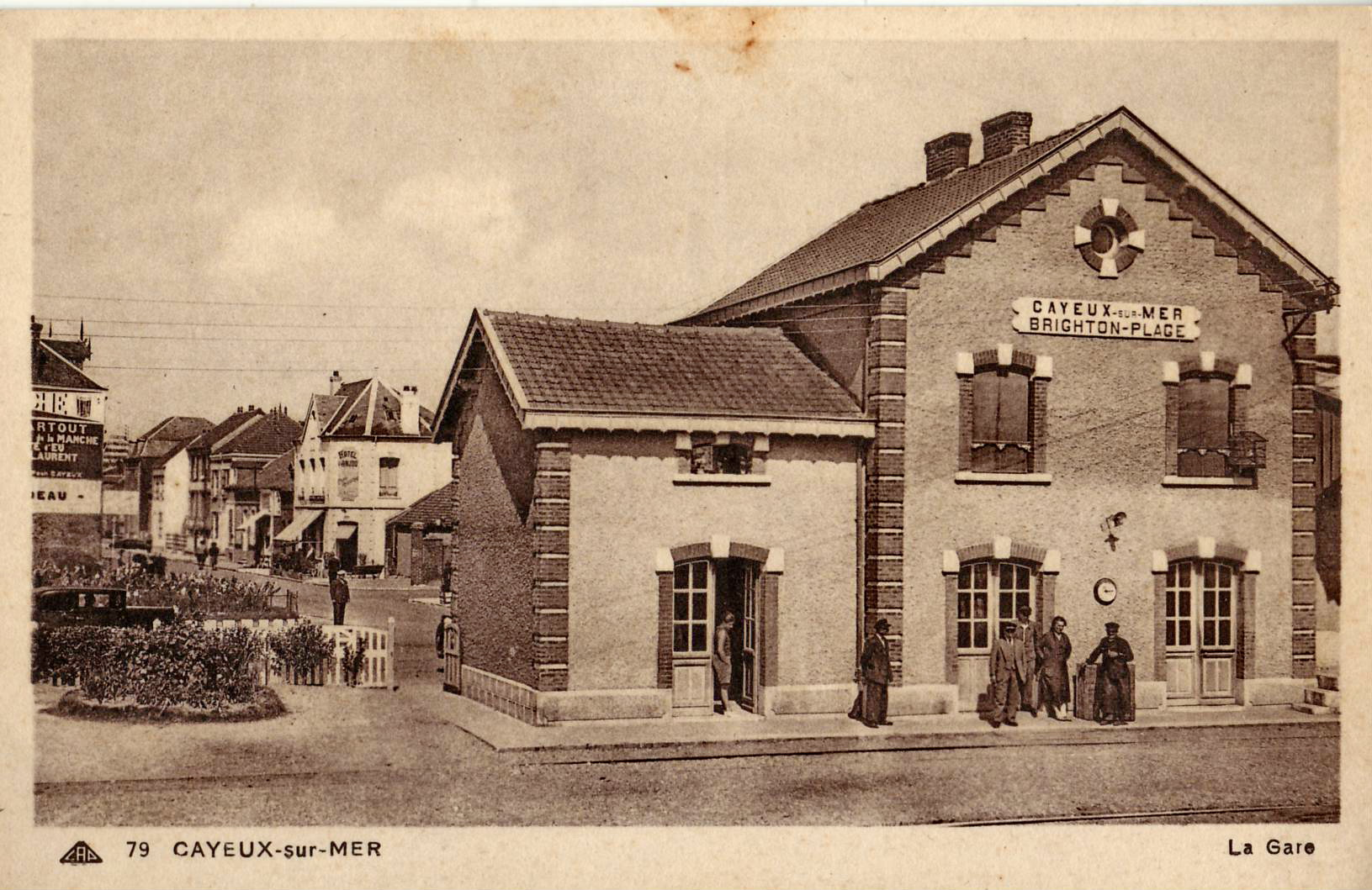 Carte postale ancienne éditée par CAD - Éditions des Galeries Modernes à Cayeux, n°79 : CAYEUX-SUR-MER - La Gare. (Chemins de fer départementaux de la Somme - ligne Ligne Saint-Valery - Cayeux - Groupe des Bains de Mer).